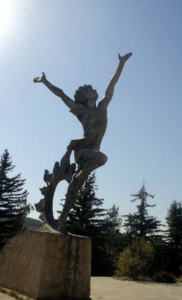 Հուշահամալիր «Վերածնունդ», Չարենցավան քաղաքի մուտքի մոտ, ճարտարապետ Հ. Առաքելյան, քանդակագործ` Խաչիկ Միրիջանյան 7/3